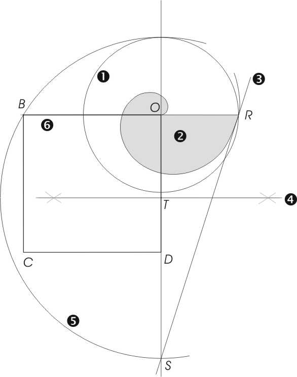 Ову слику сам ја креирао. Од сада па надаље и убудуће је ЈАВНО ВЛАСНИШТВО.